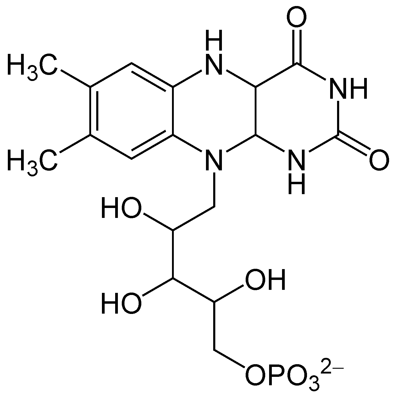 Bacterial luciferin